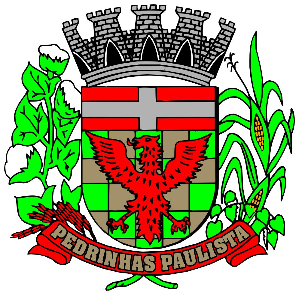 Brasão do Município de Pedrinhas Paulista - SP